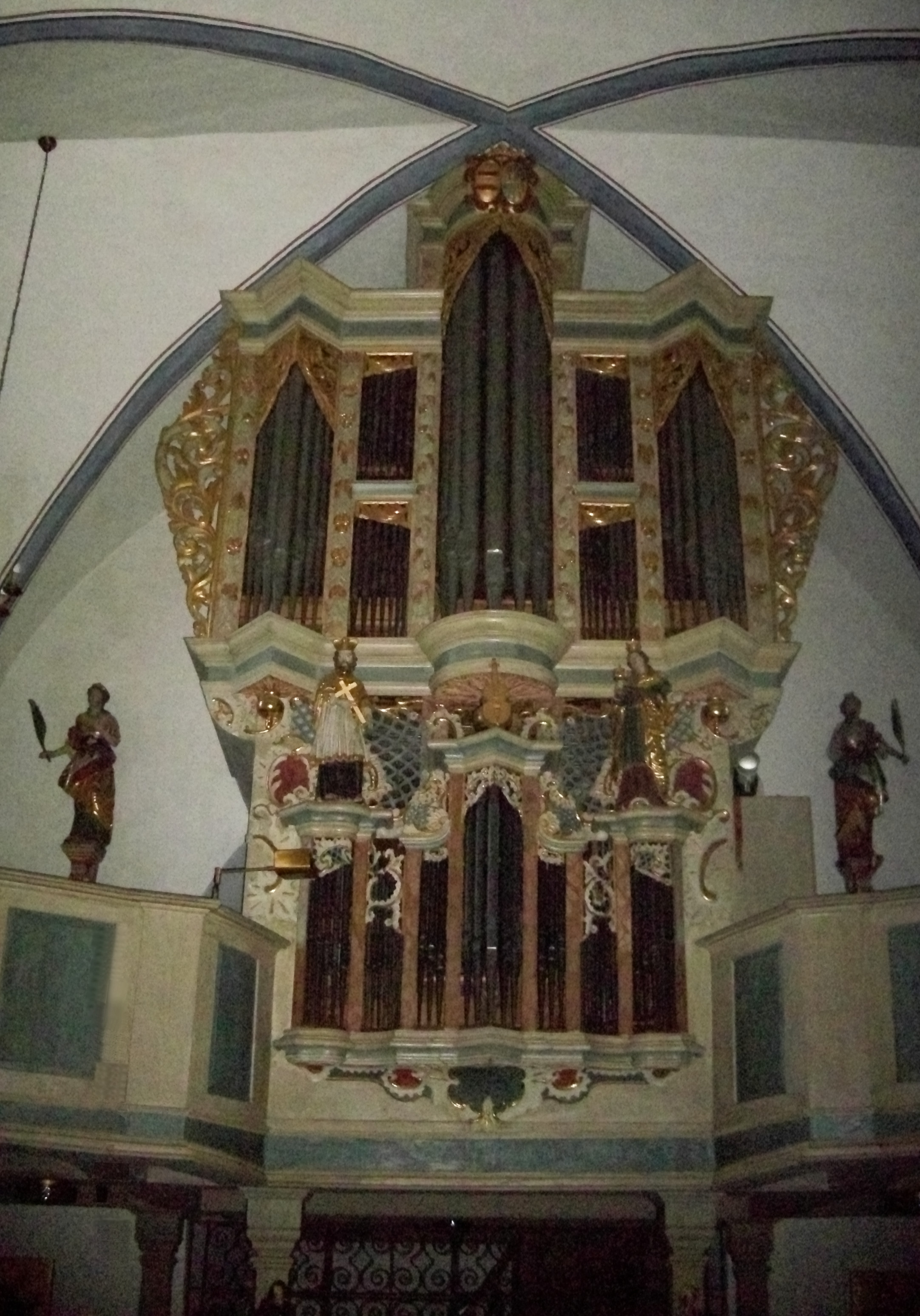 Orgel in der Pfarrkirche Oberkirchen (Schmallenberg), Hochsauerlandkreis